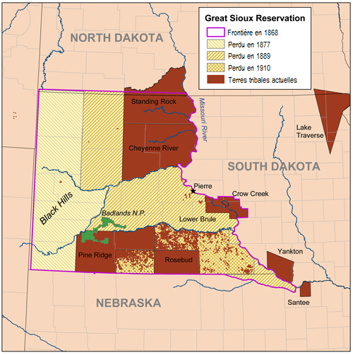 Carte de la Great Sioux Reservation, original de Kmusser.